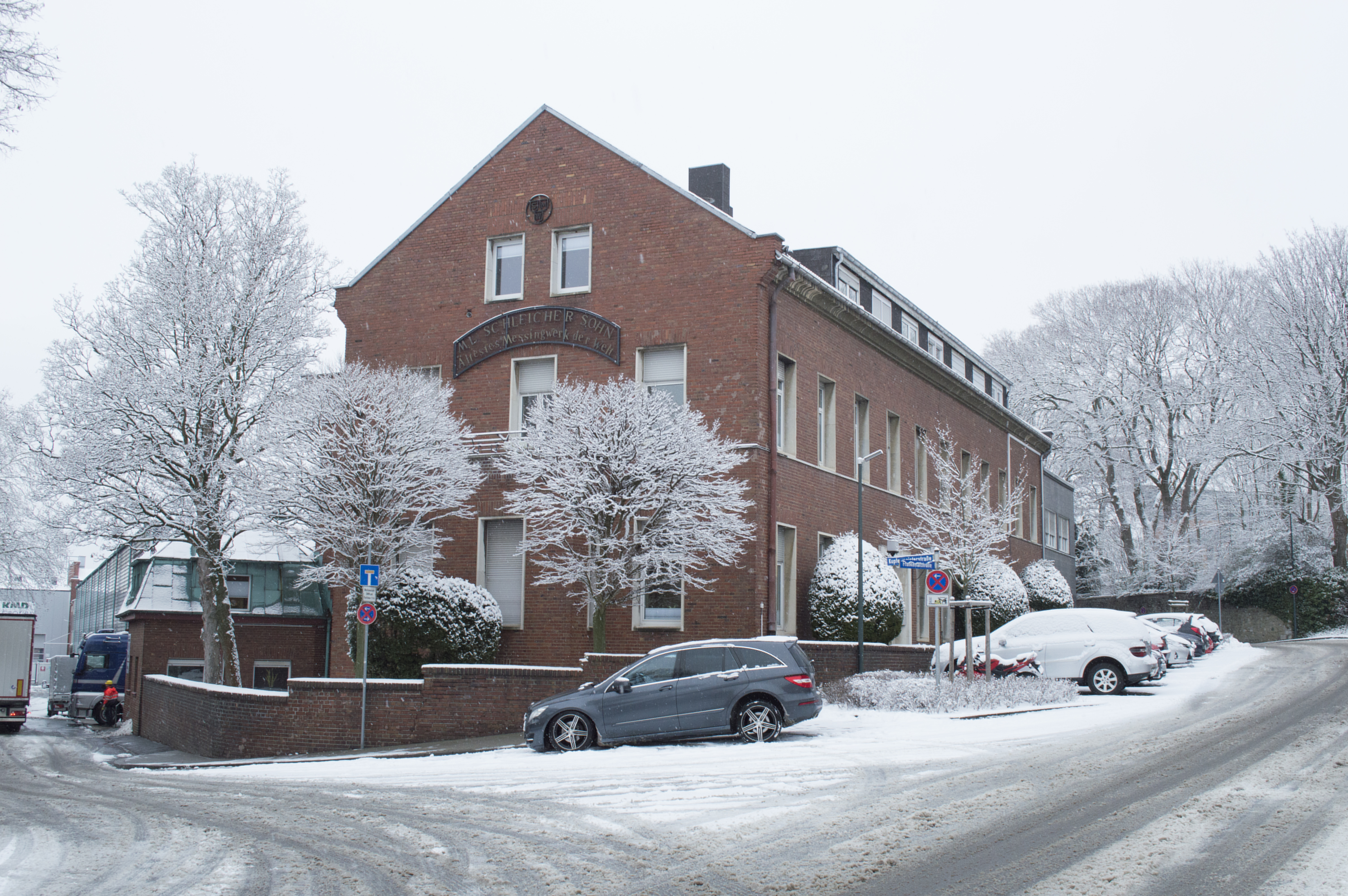 KMD Group an der Kupfermeisterstraße. Der aktuelle Firmensitz des Unternehmens.